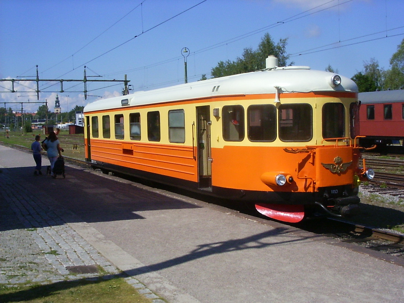 Sveriges järnvägsmuseum, Gävle. Gävle, Gävle